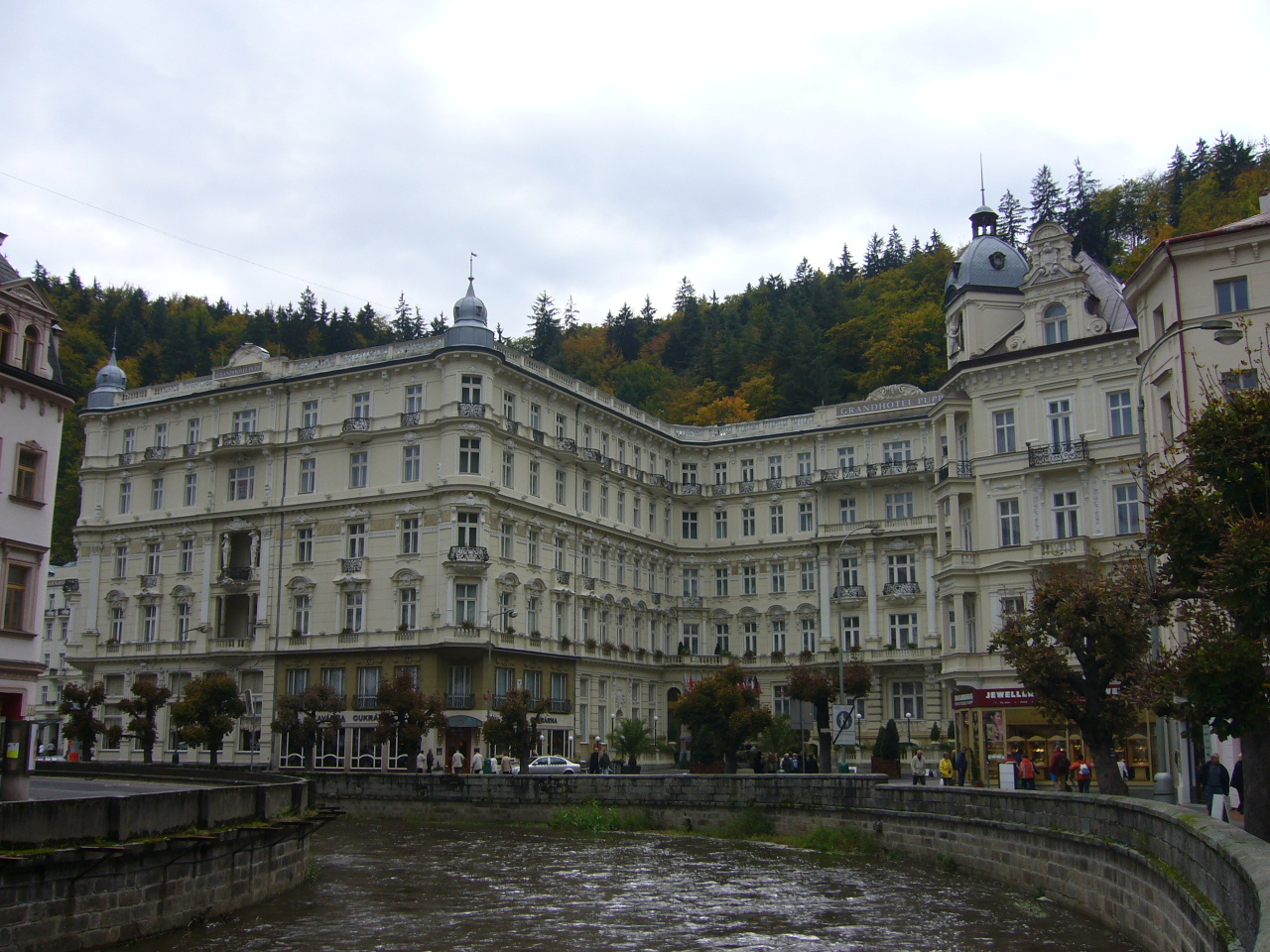 Karlovy Vary (Cidade Balneario), República Checa, Setembro 2007